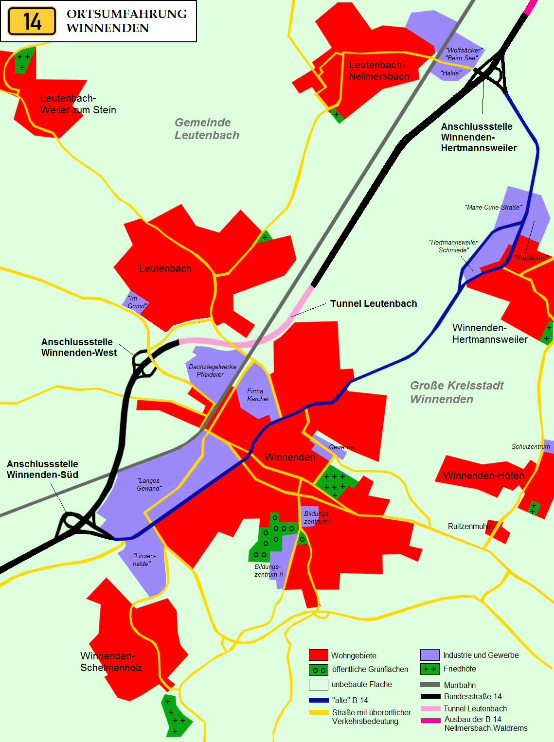 Karte des Verlaufs der Ortsumfahrung Winnenden der B 14 mit Umgebung